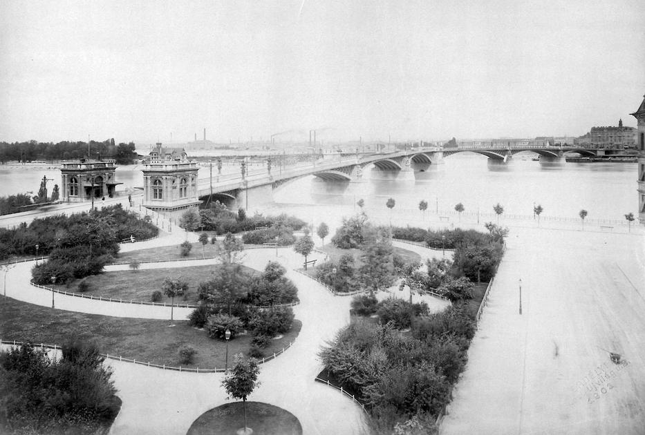 Margit híd és a Parlament a budai alsó rakpartról nézve, 1914